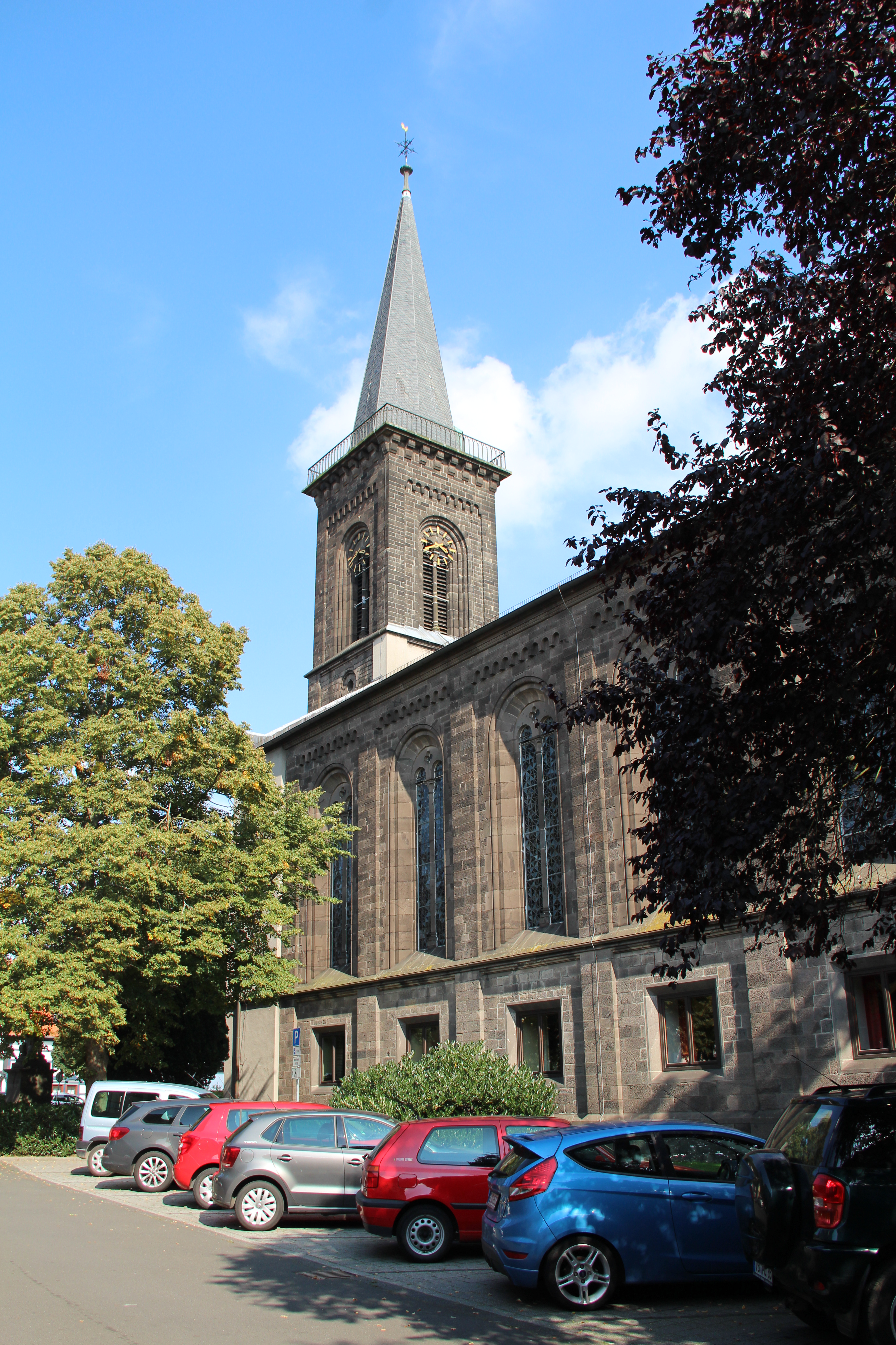 Ev. Kirche